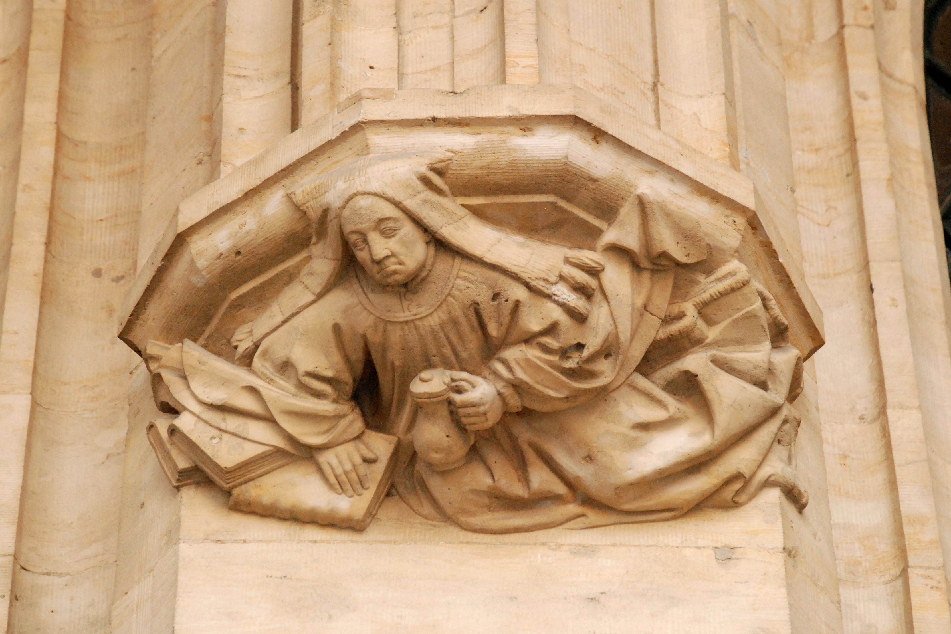 Belgique - Bruxelles - Grand-Place - Hôtel de ville - Cellier des Moines